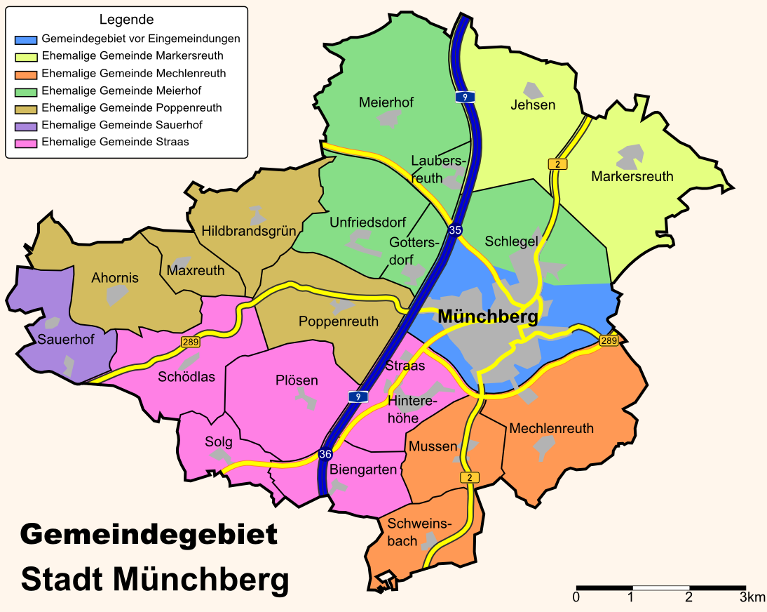 Übersichtskarte über das Stadtgebiet Münchberg inklusieve Eingemeindungen